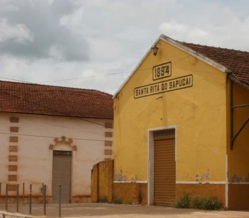 Vista da Estação ferroviária de Santa Rita do Sapucaí, Minas Gerais, Brasil.